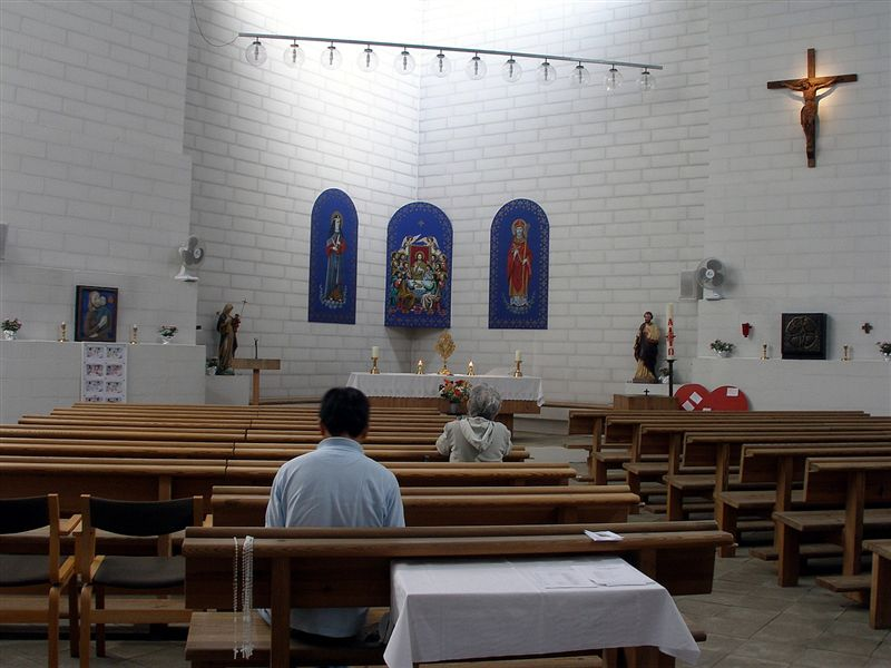 Esbjerg Sankt Nikolai Kirke i Danmark. Kirkerummet set mod alteret